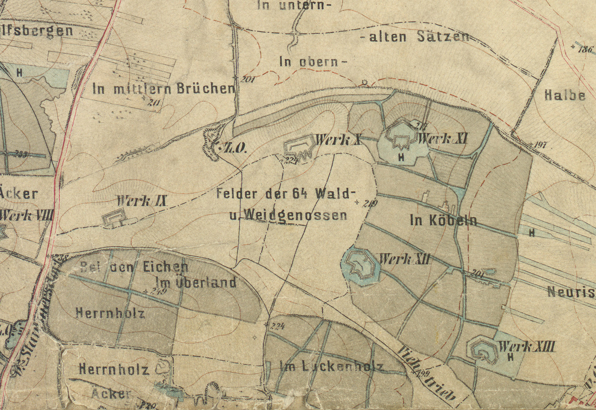 historische Landkarte: Gradkartenblatt Zone 12 Colonne XV Section c1 (später 4657/3a). Bisamberg westlich Korneuburg, Hagenbrunn, Enzersfeld. Franzisco-josephinische (3.) Landesaufnahme der österreichisch-ungarischen Monarchie. Aufnahmeblatt 1:12.500. Aufgenommen 1873